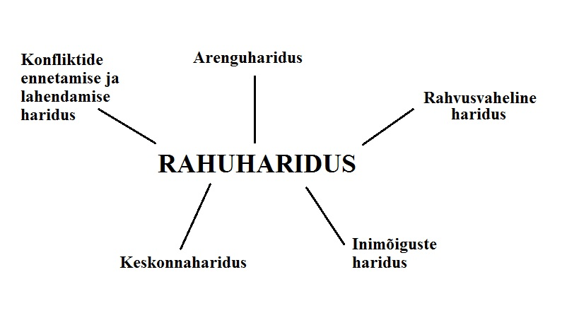 Rahuhariduse valdkonnad